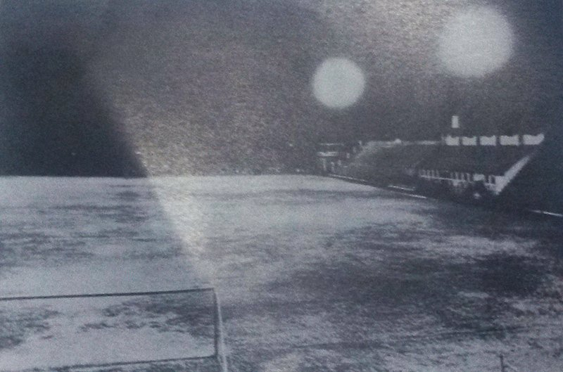 Inauguración de las luces artificiales del estadio de Unión de Santa Fe en 1931